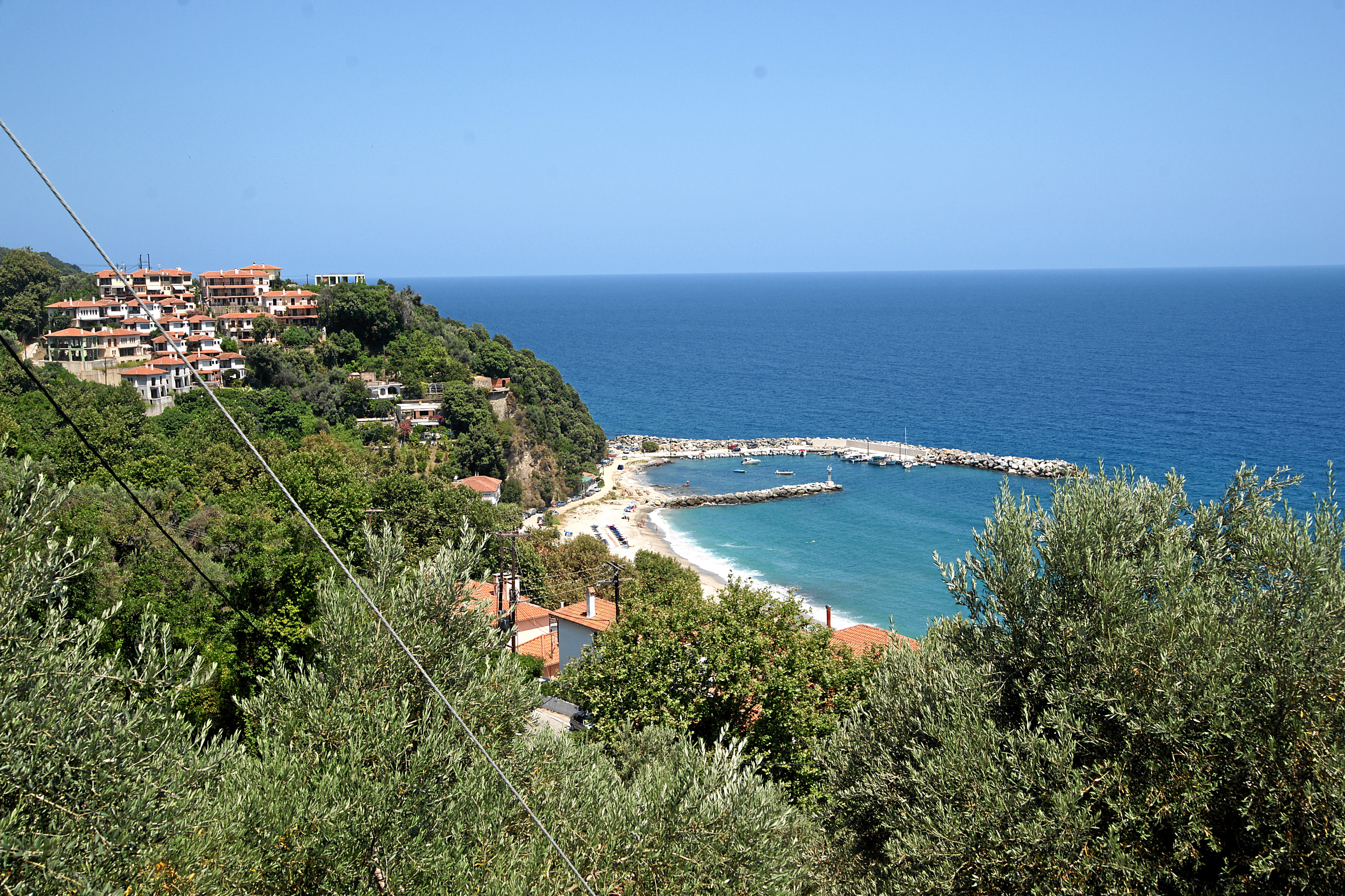 Pilion - Ostküste: Agios Ioannis